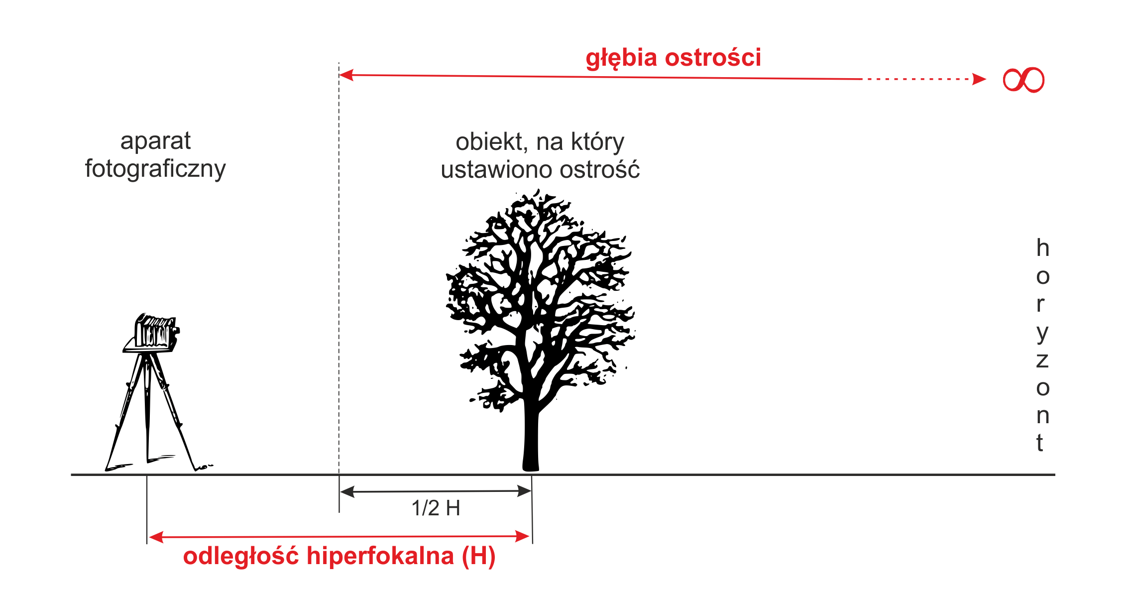 Schemat ilustrujący pojęcie "odległości hiperfokalnej"